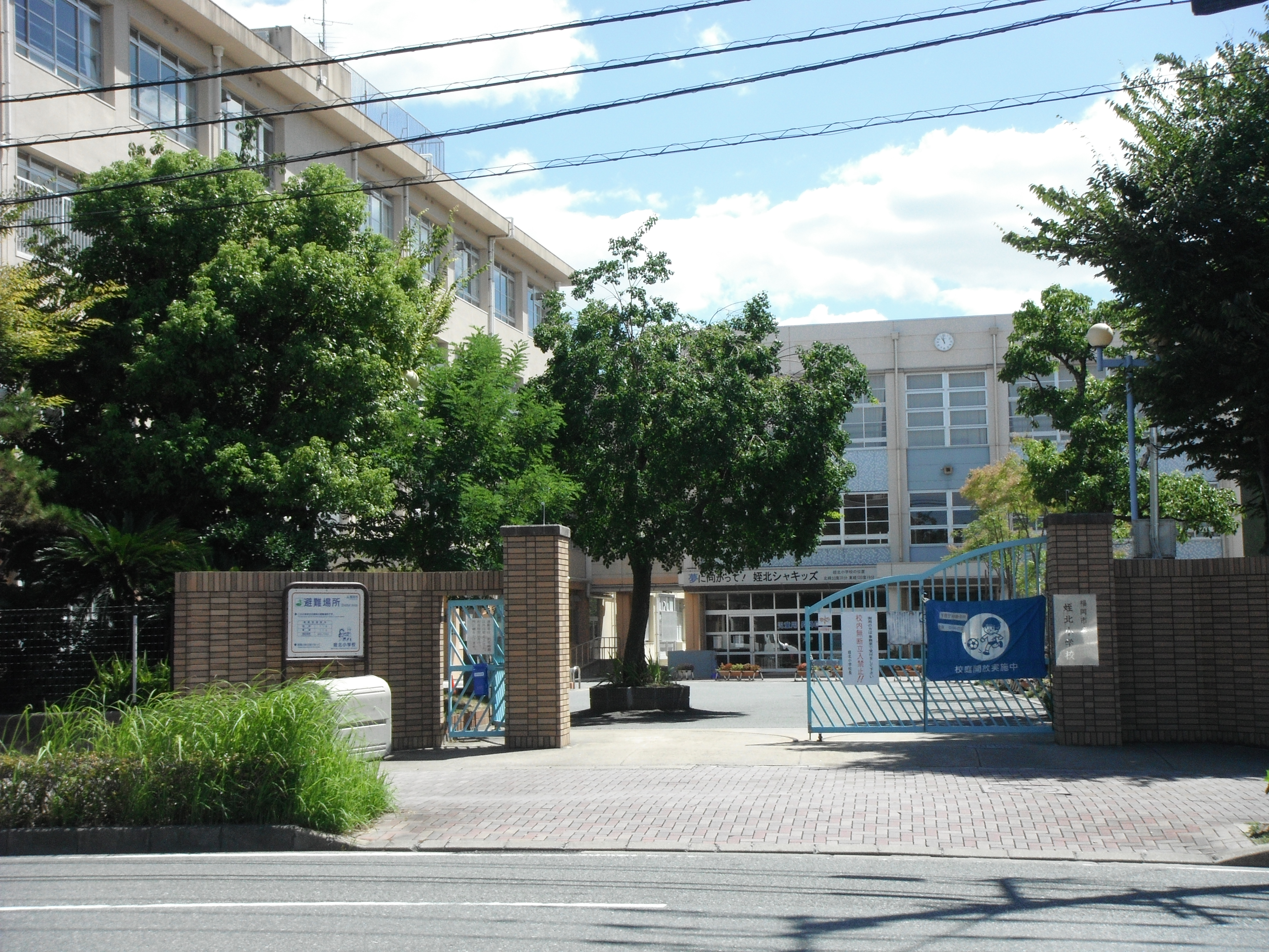 福岡市立姪北小学校